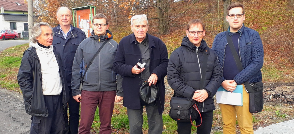 Fotka ze setkání 12.11.2019